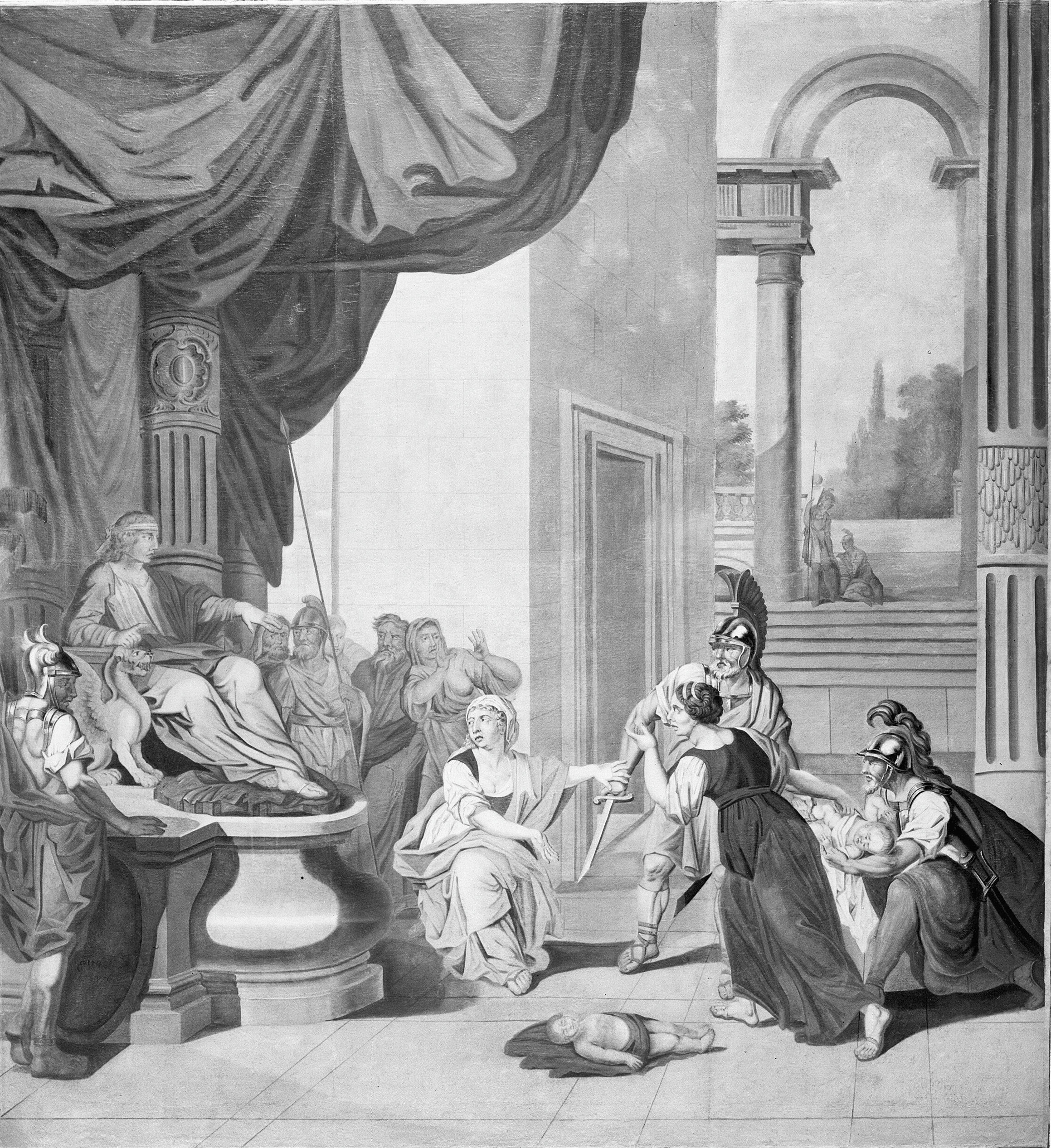 Raadhuis: wandschildering - Salomo's rechtspraak